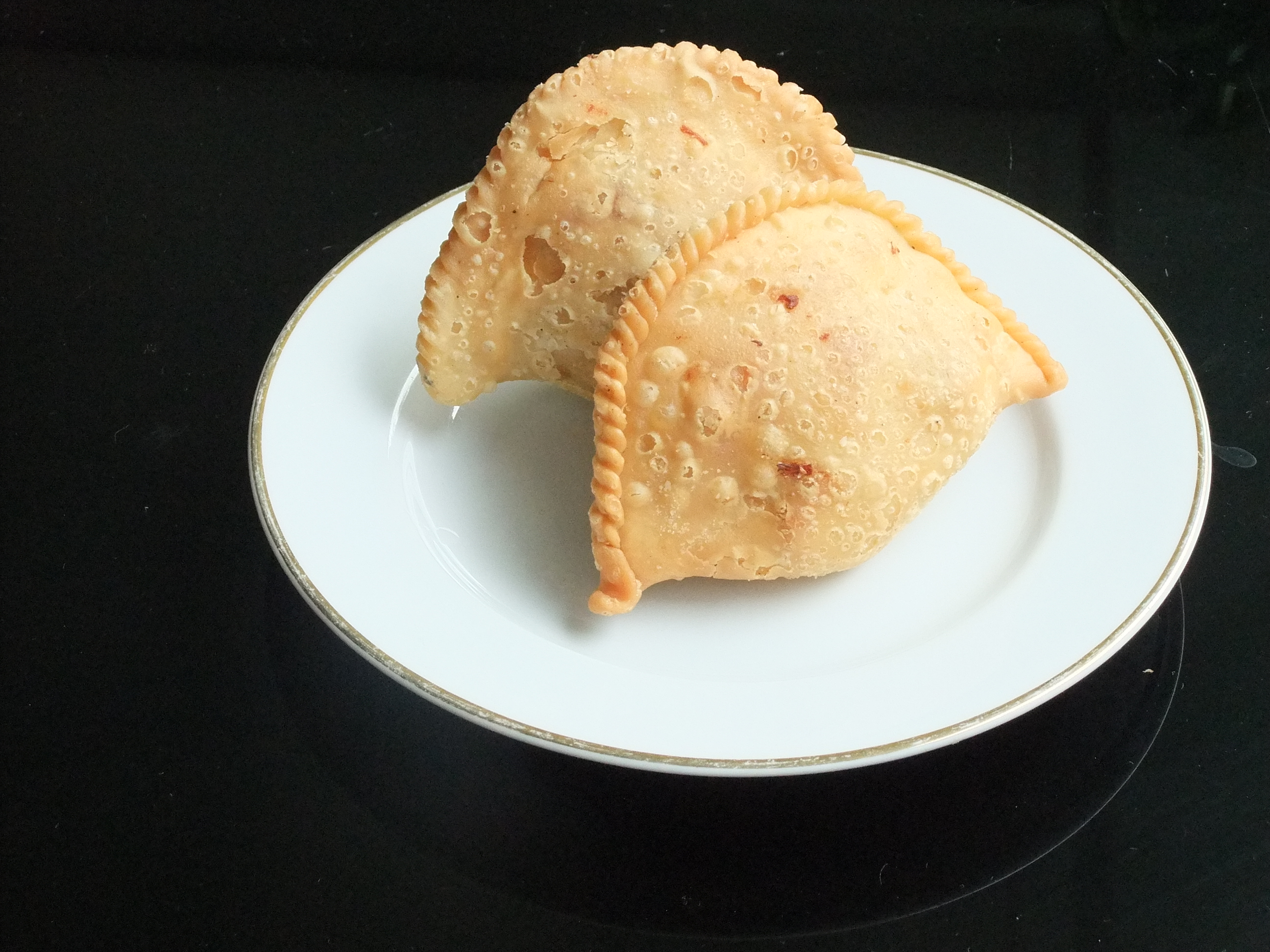 Pastel Mak Cik, Kelapa Gading